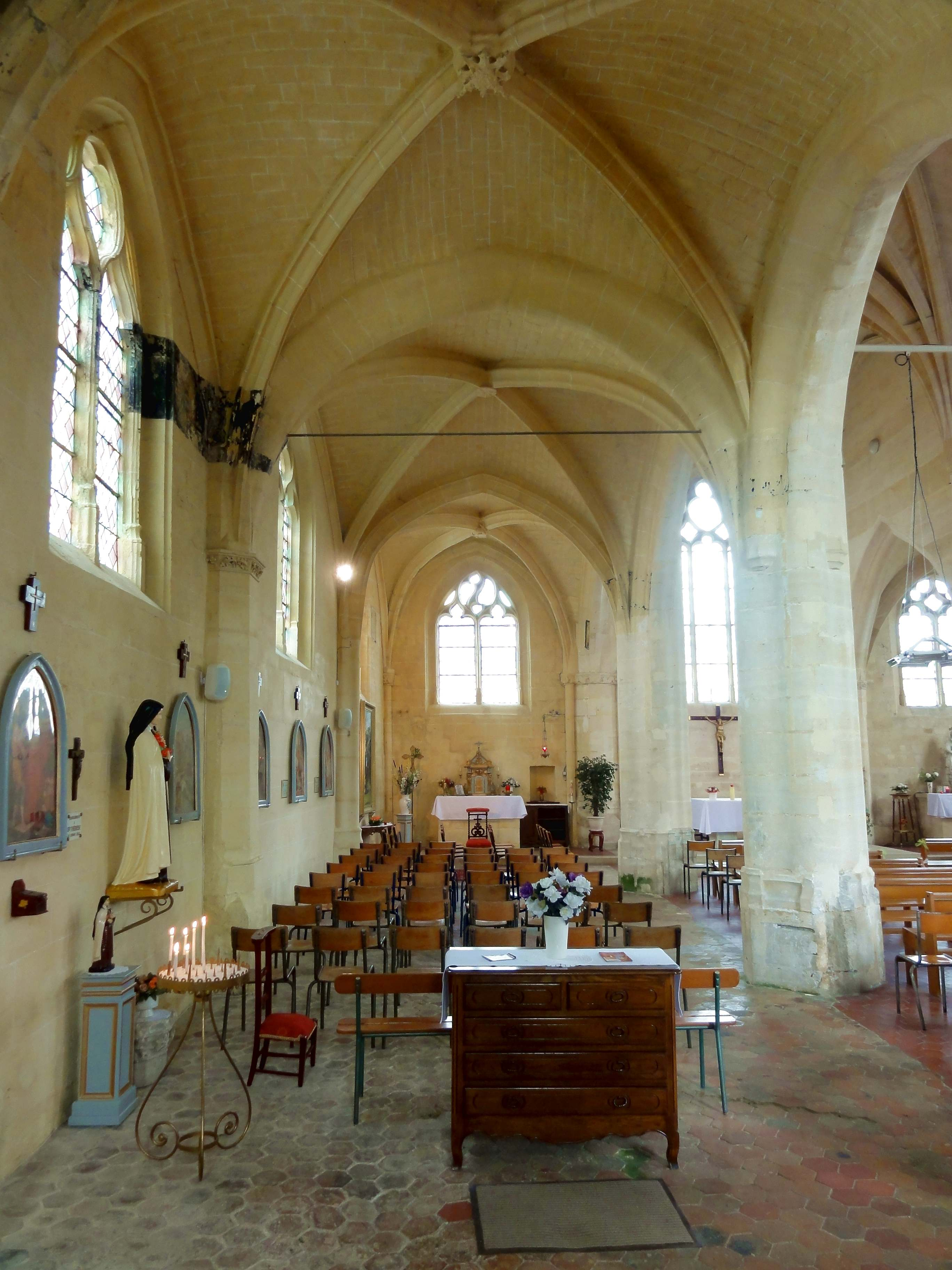 Intérieur de l'église - voir titre.